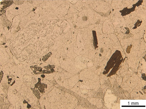 Latite. nicol paralleli